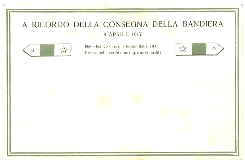 Cartolina militare a ricorda della consegna della bandiera al 257 reggimento della Brigata Tortona (ragazzi del 99)